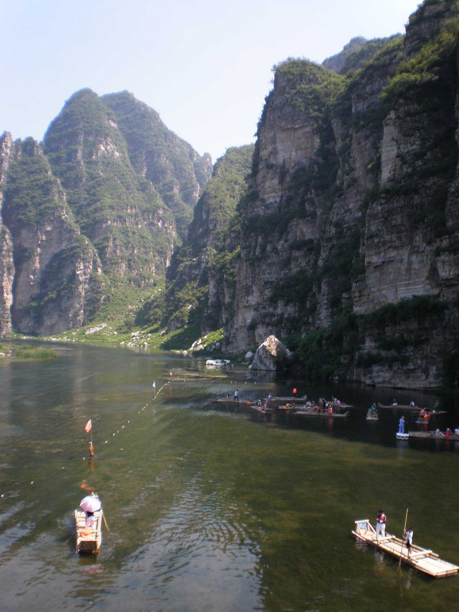 shidu_river